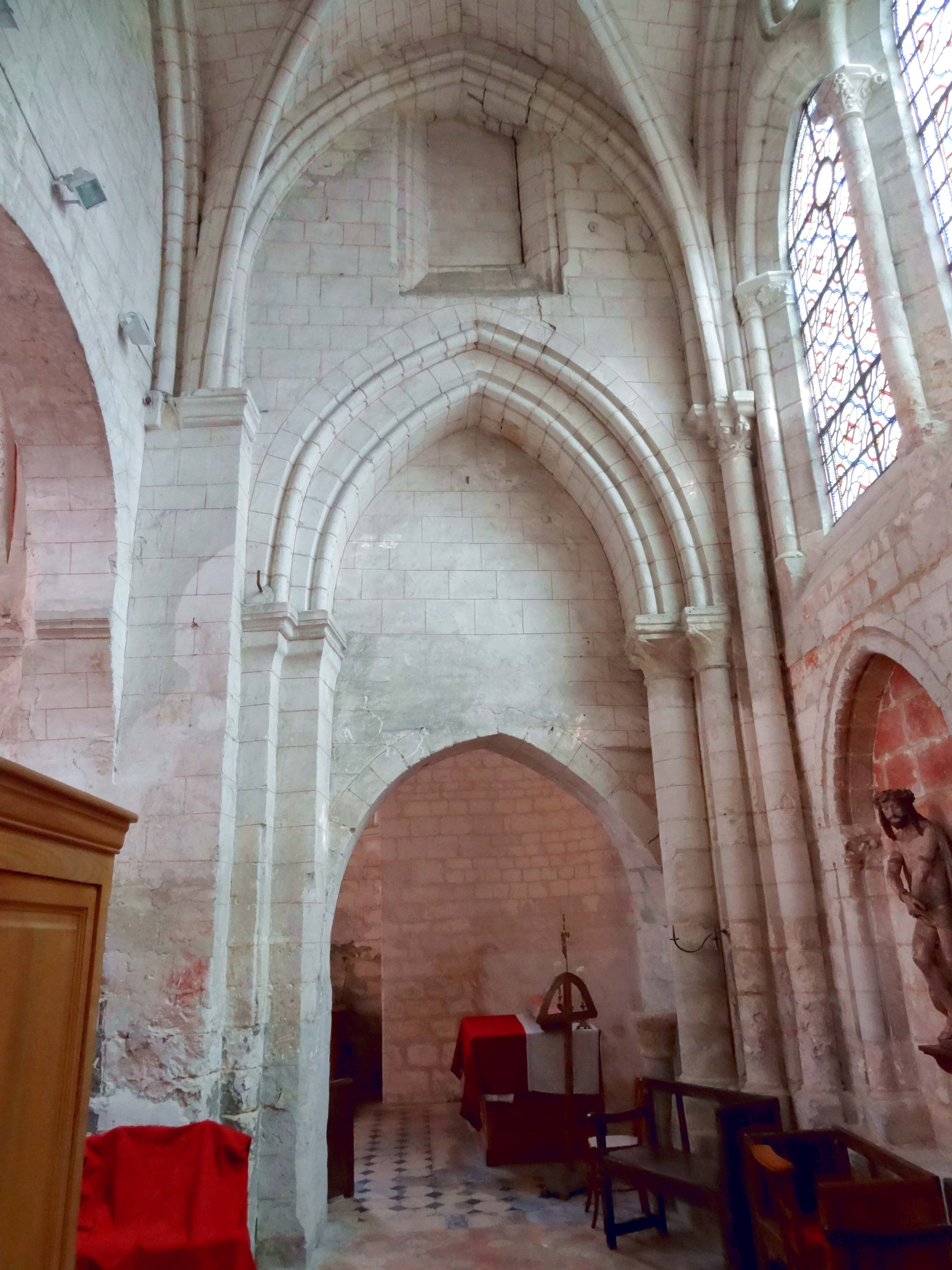 Intérieur de l'église - voir titre.